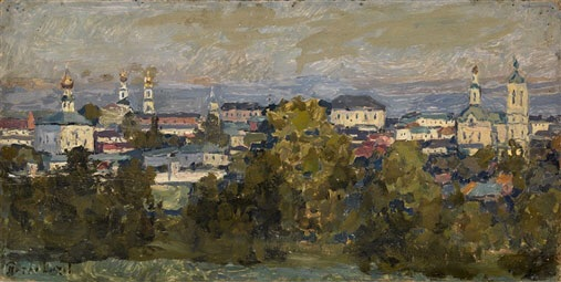 Stadt Vladimir